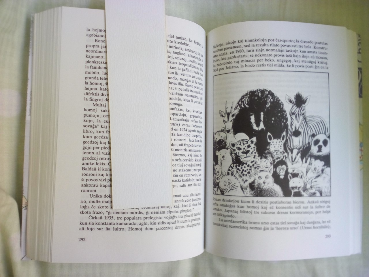 El Faktoj kaj fantazioj de Boulton